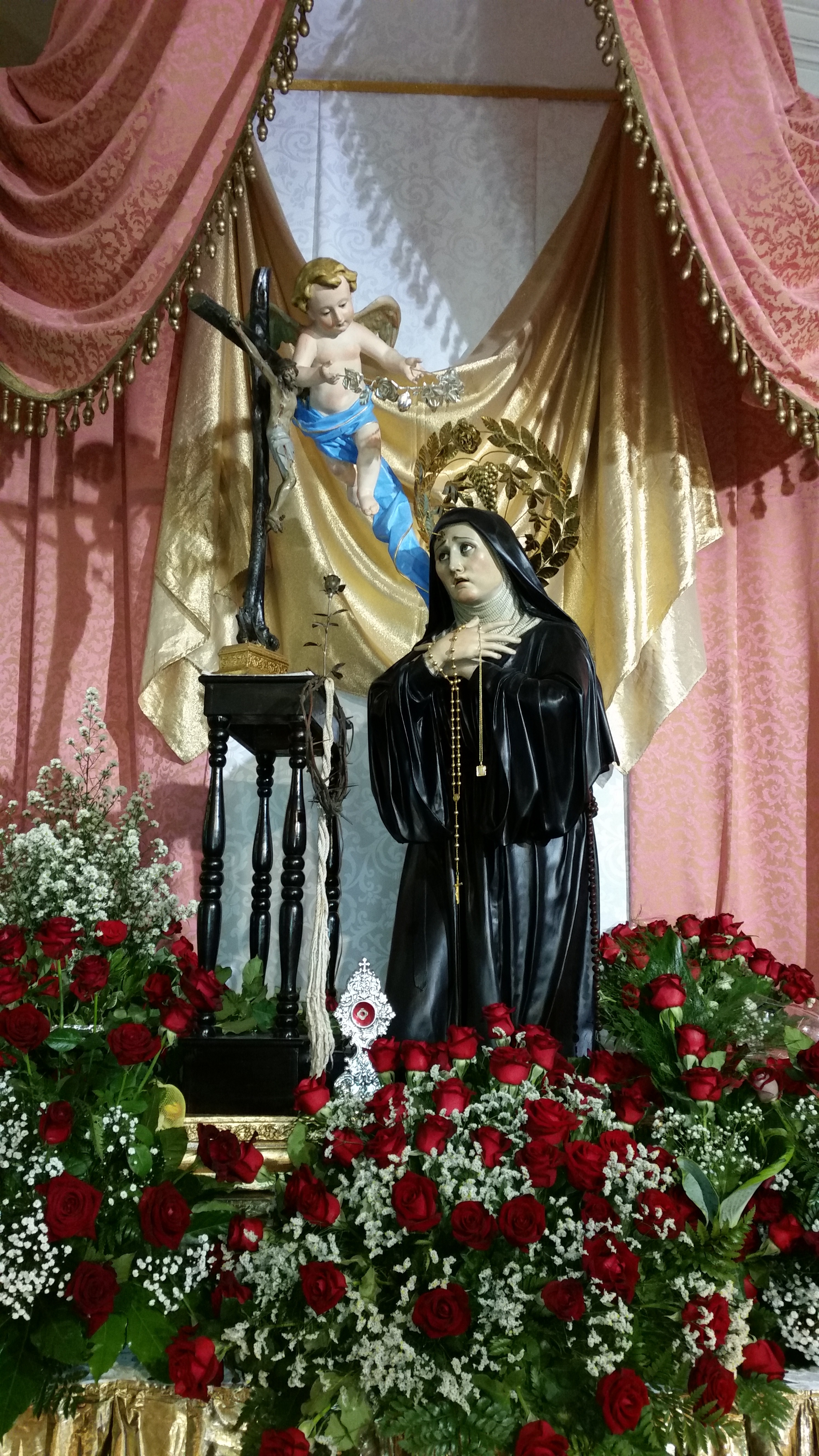 Statua di S. Rita da Cascia venerata in Avellino